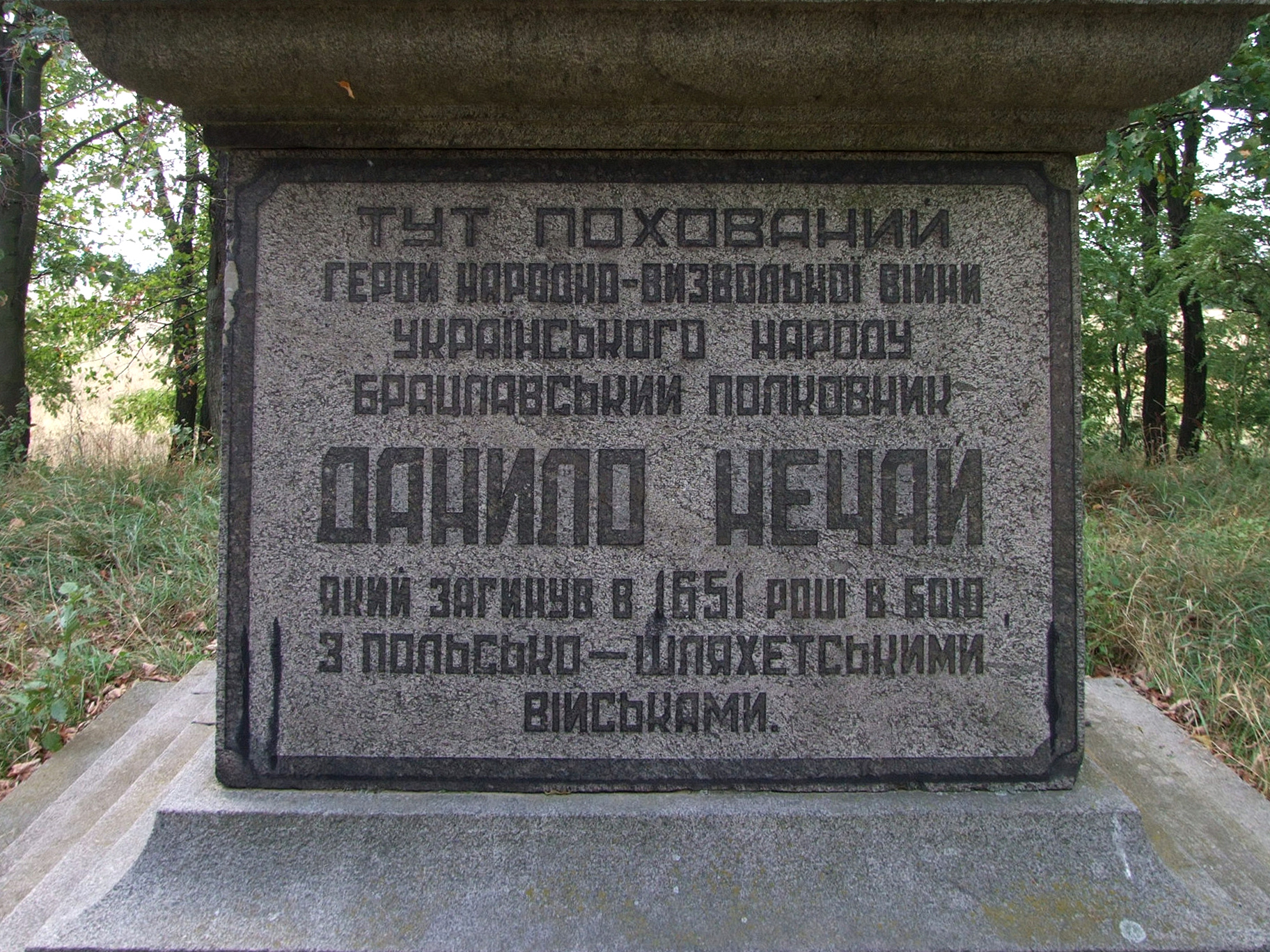 Могила соратника Богдана Хмельницького Данила Нечая. Обеліск, 1954 р.